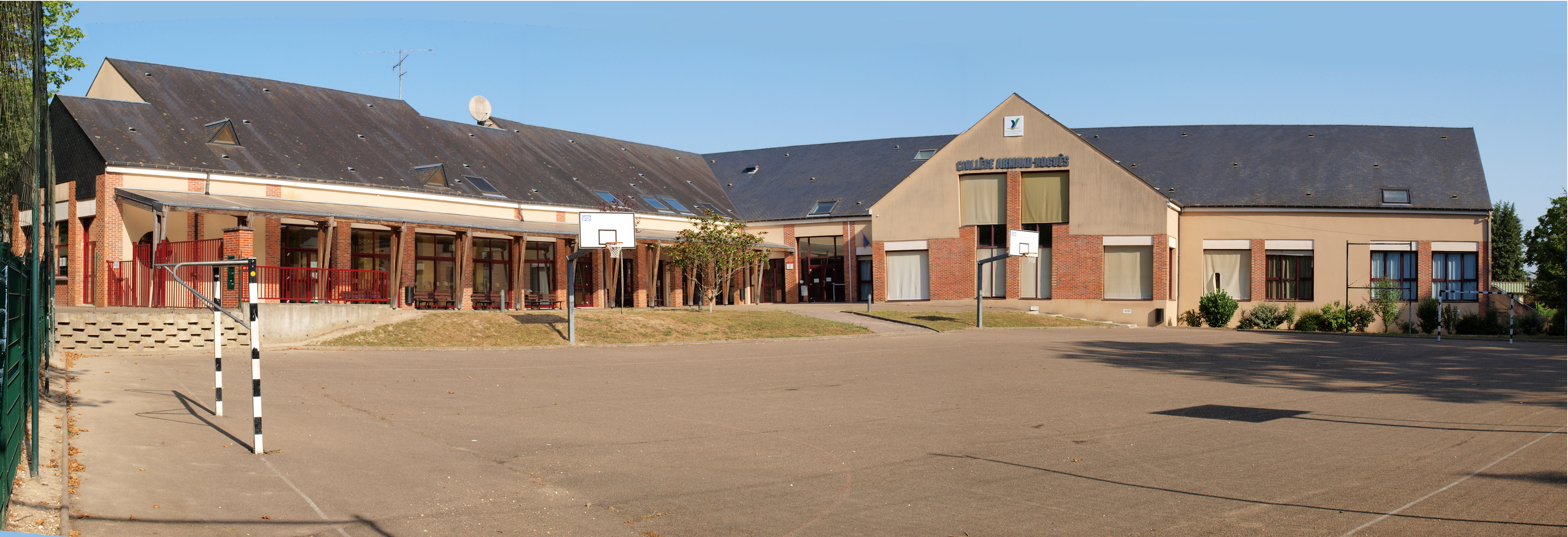 Collège Armand-Noguès de Saint-Fargeau (Yonne, France)